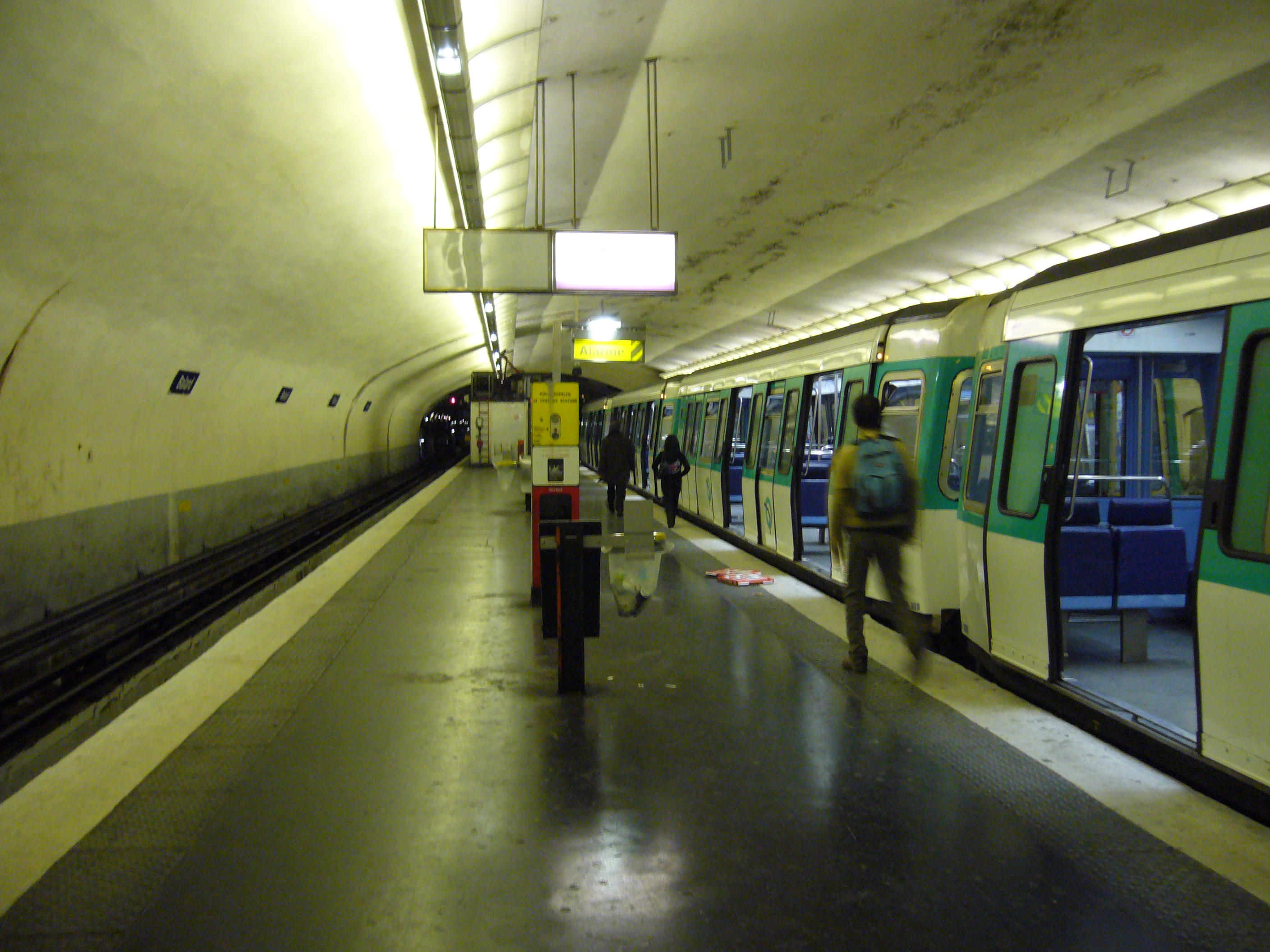 Vue du demi-quai en direction de Créteil à la station Balard sur la ligne 8 du métro de Paris.